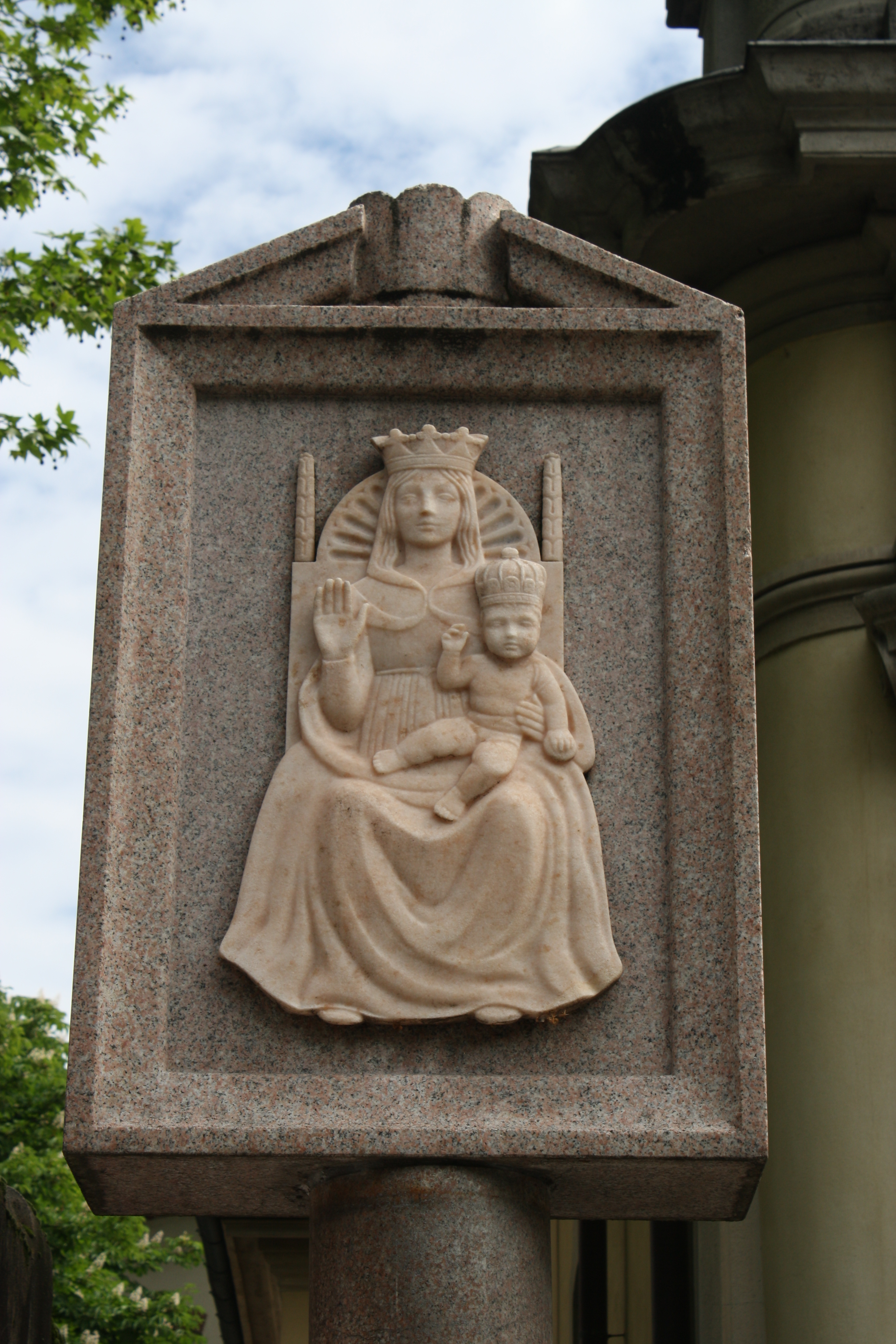 Raffigurazione della Madonna dell'Aiuto in granito rosa posta accanto alla chiesa di San Giuseppe.